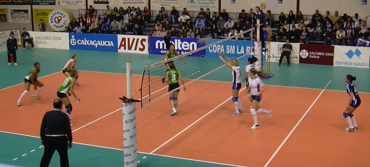 (English) Female voleyball match (Español) Partido de voleibol femenino durante la Copa de la Reina '2004 en España entre el CSC Ávila y el Universidad de Granada (14-2-2004).